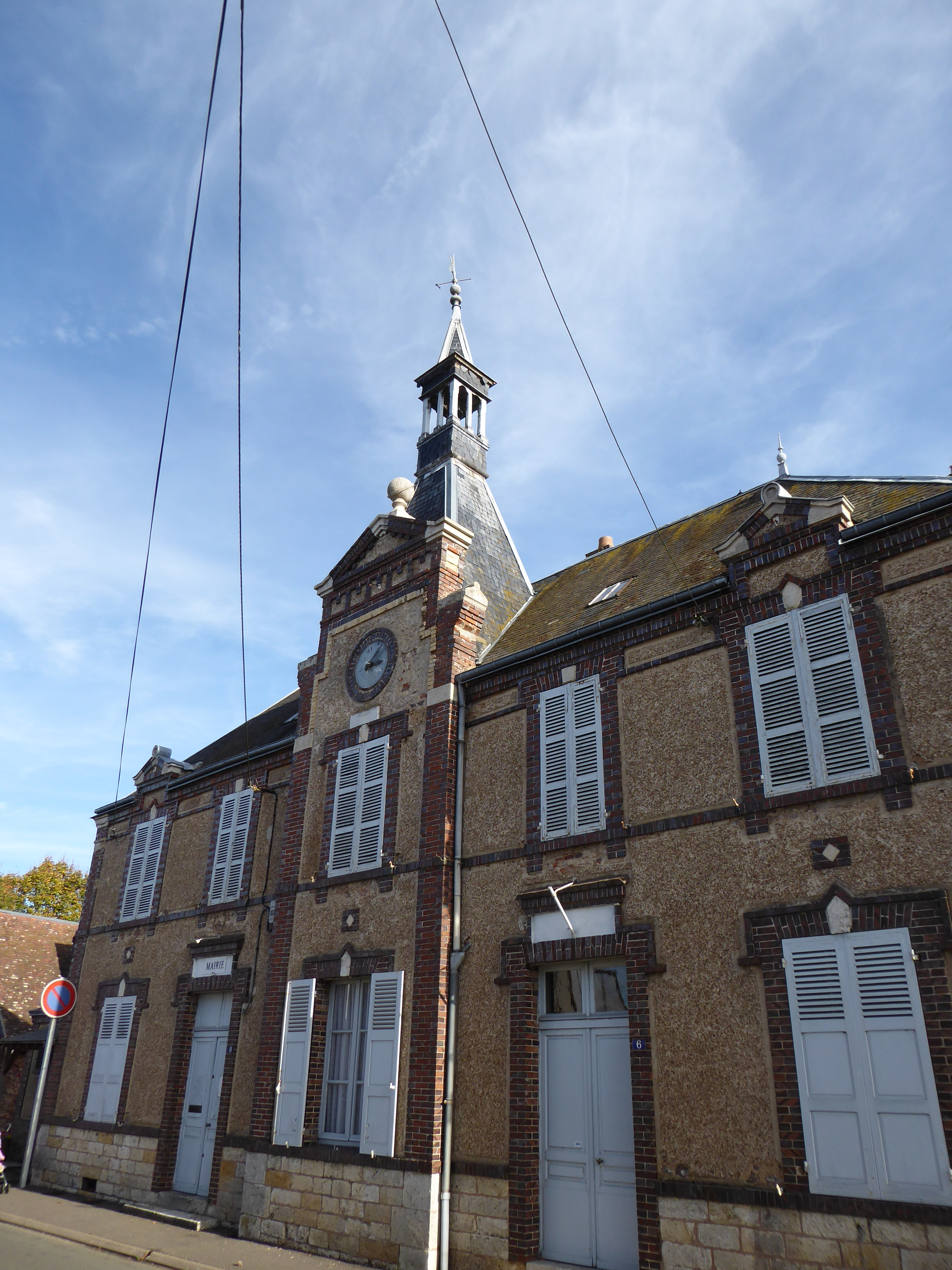 La mairie de Saumeray et son clocheton, Eure-et-Loir, France.